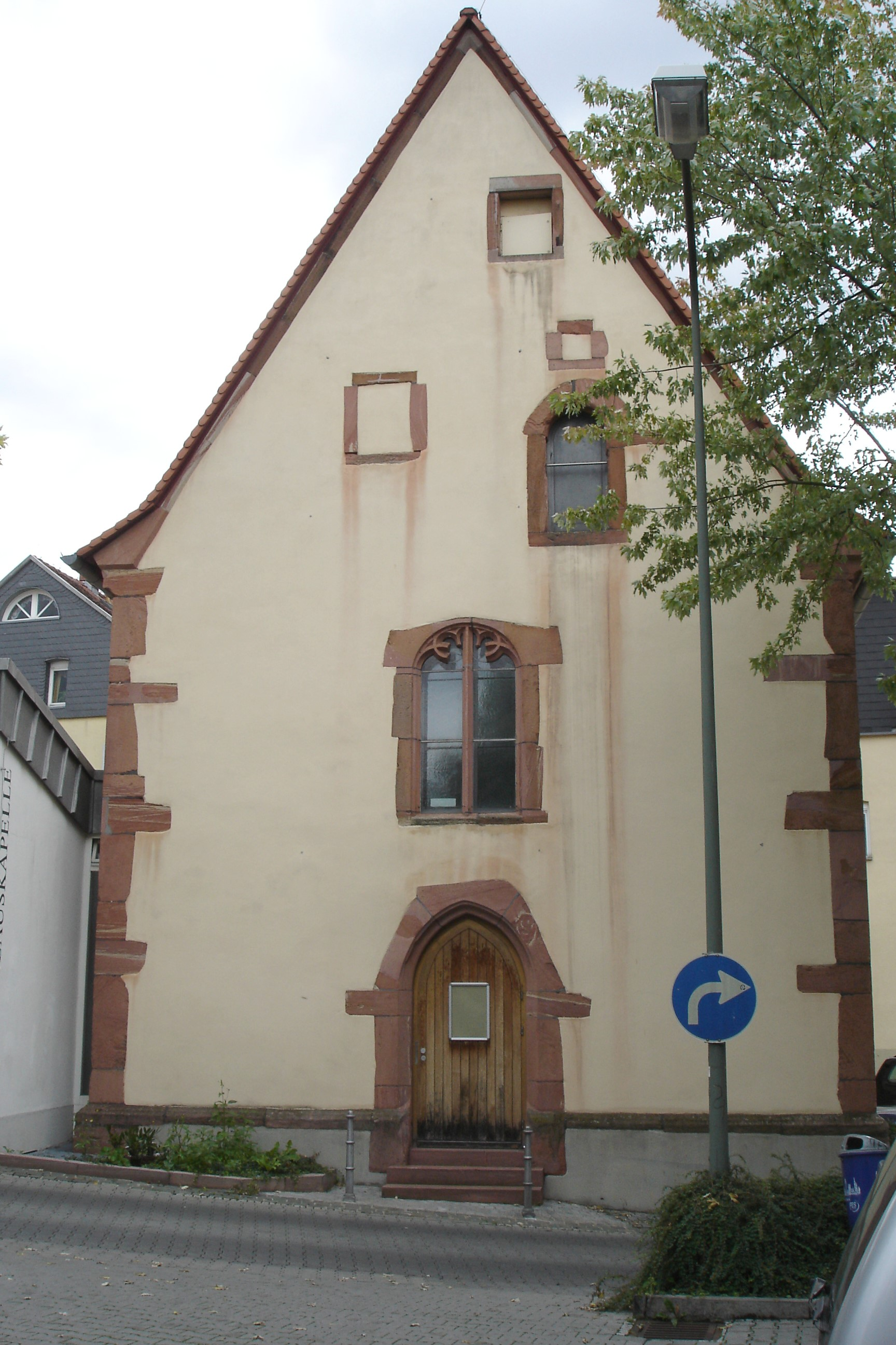 Nikolauskapelle Bergen, eigene Aufnahme, August 2006